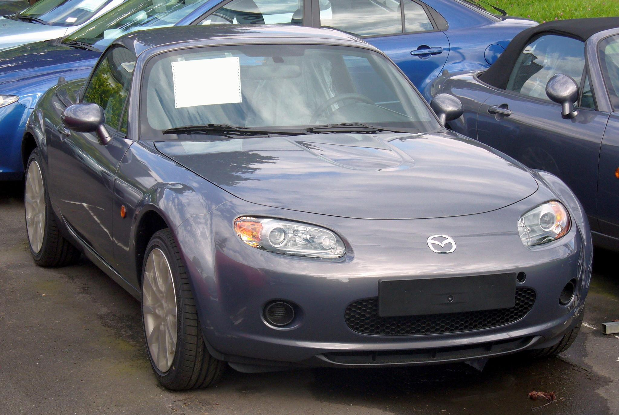 Mazda MX-5 Roadster-Coupé